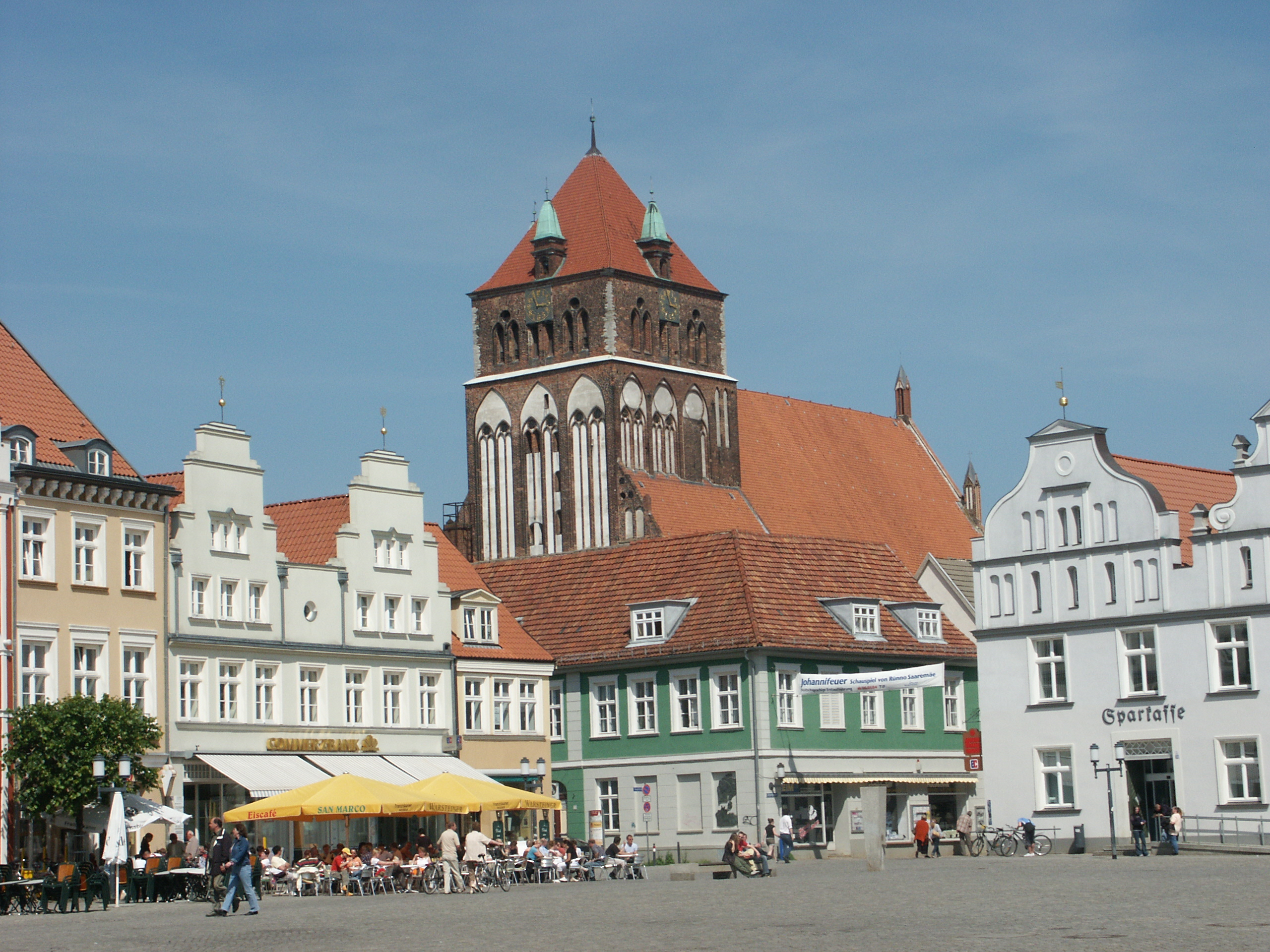 Marktplatz in Greifswald mit Blick auf die Kirche